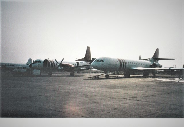 Andover 9Q-CPW et Caravelle 10B3 9Q-CPI au parking aéroport international de Kinshasa/Ndjili